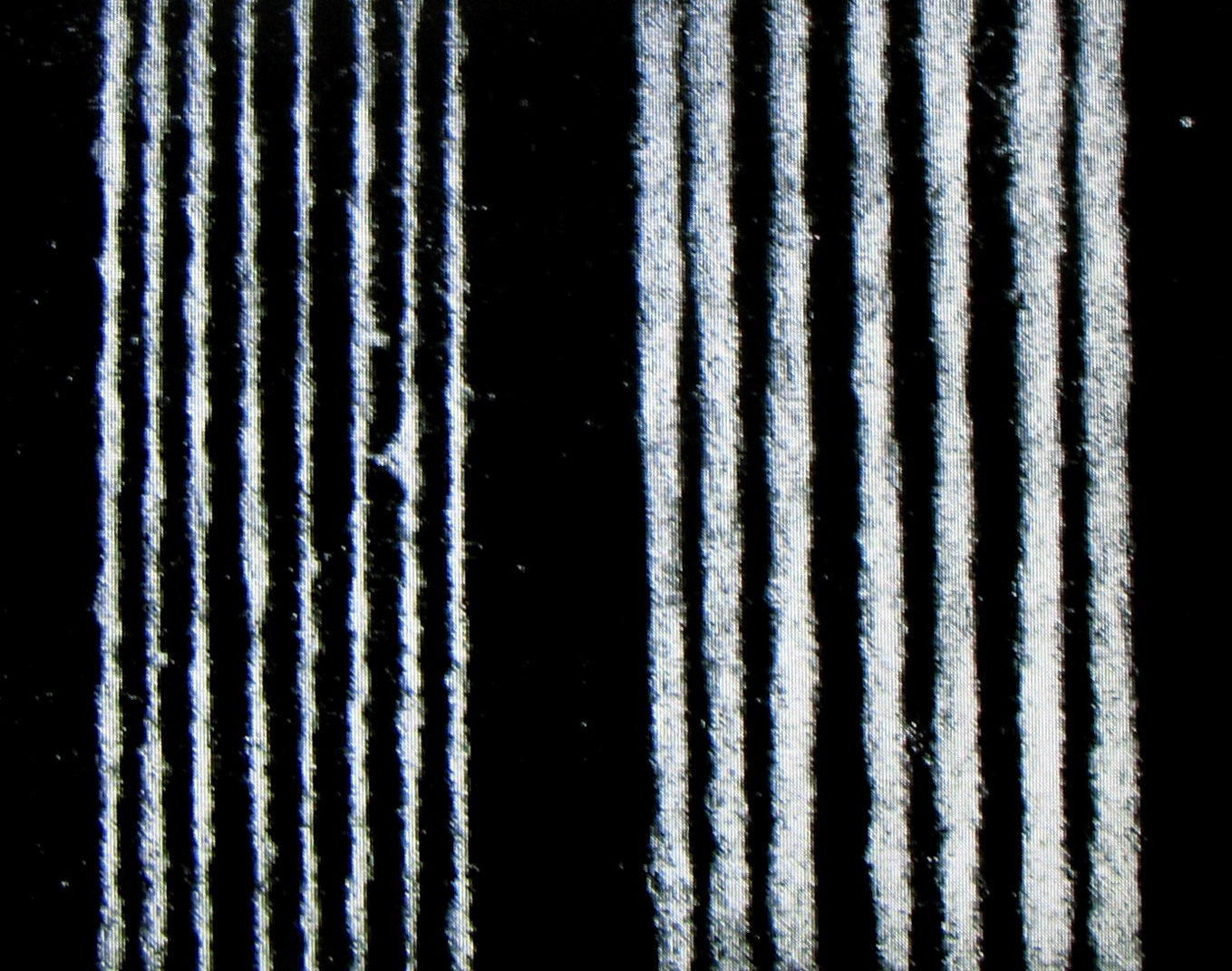 Garn und Vorgarn aus Reißwolle Shoddy